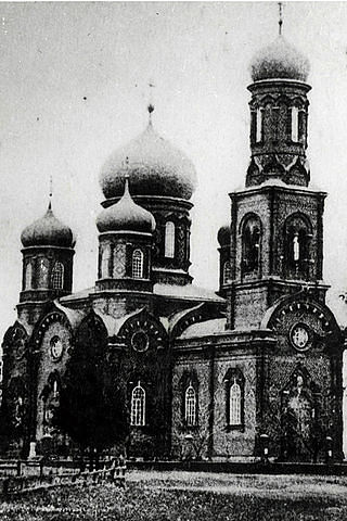 Николаевский собор в Константиновске Ростовская область (бывшая Михайло-Архангельская церковь).